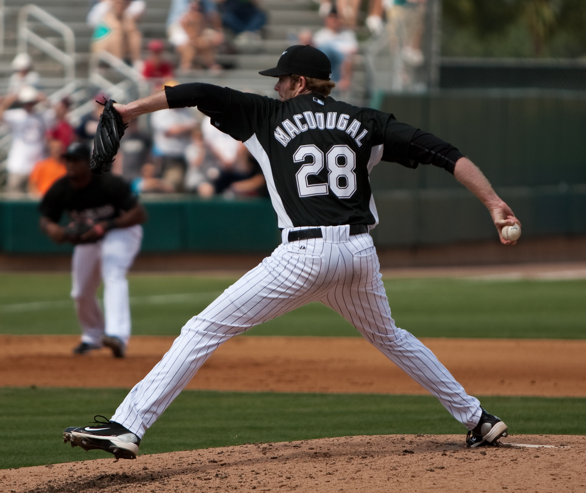 Mike MacDougal